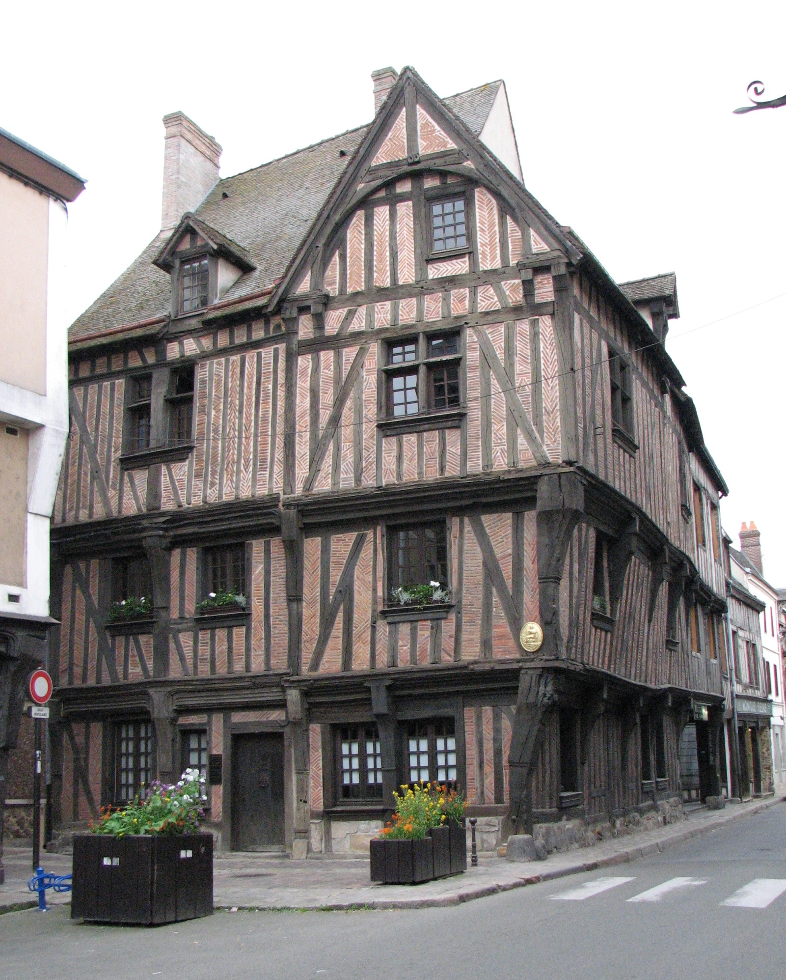 Maison de l'Obrador à Nogent-le-Roi (Eure et Loir, France).En langue occitane, obrador signifie un homme de loi. Cette maison est aussi appelée "maison de Diane" du nom de Diane de Poitiers (1500-1566), seconde épouse de Louis de Brézé, seigneur de Nogent (source panneau d'information sur la maison)